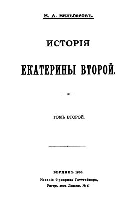 Титульный лист "Истории Екатерины II" Бильбасова